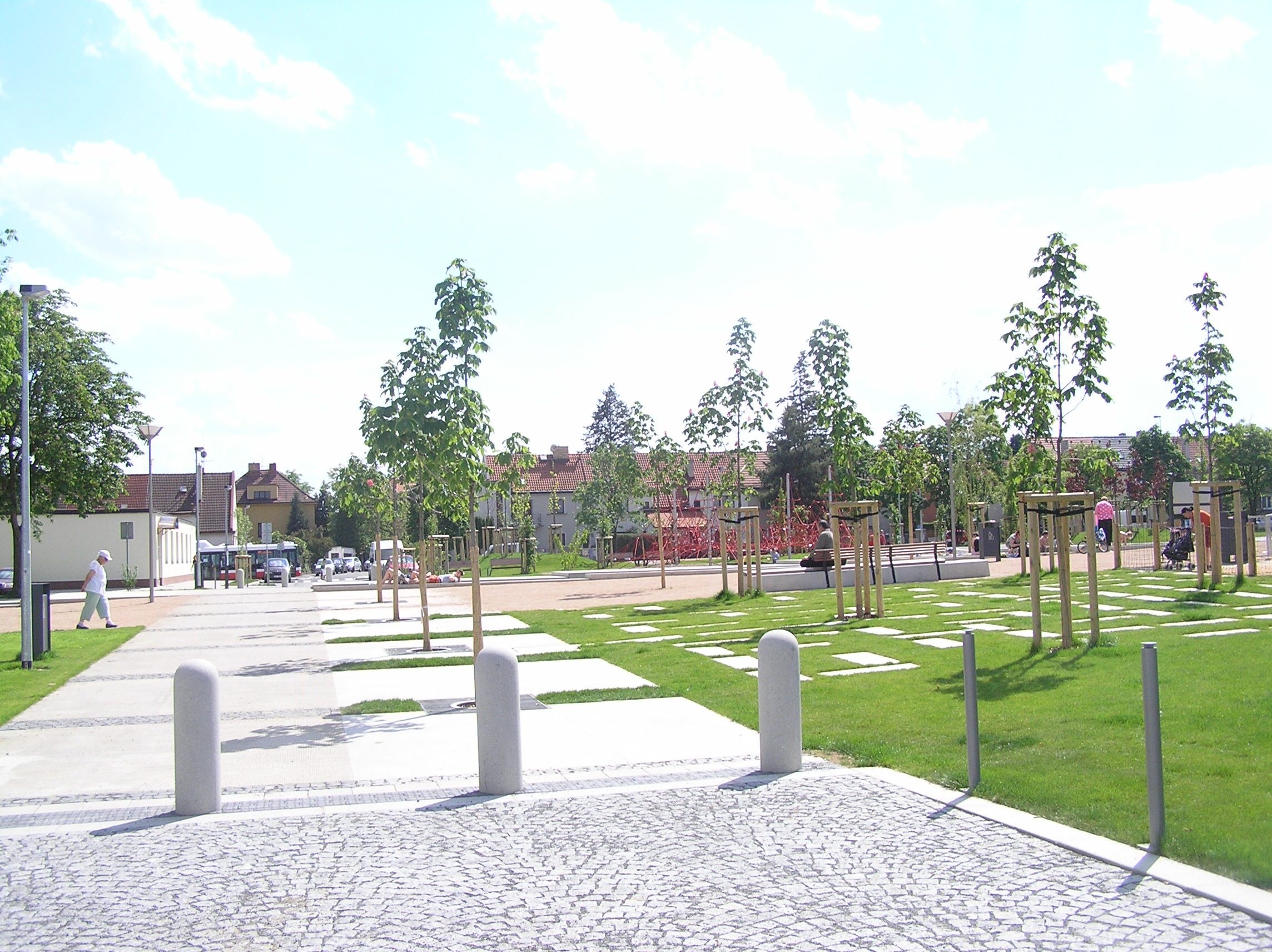 Park Malinová Chrpová - cesta.